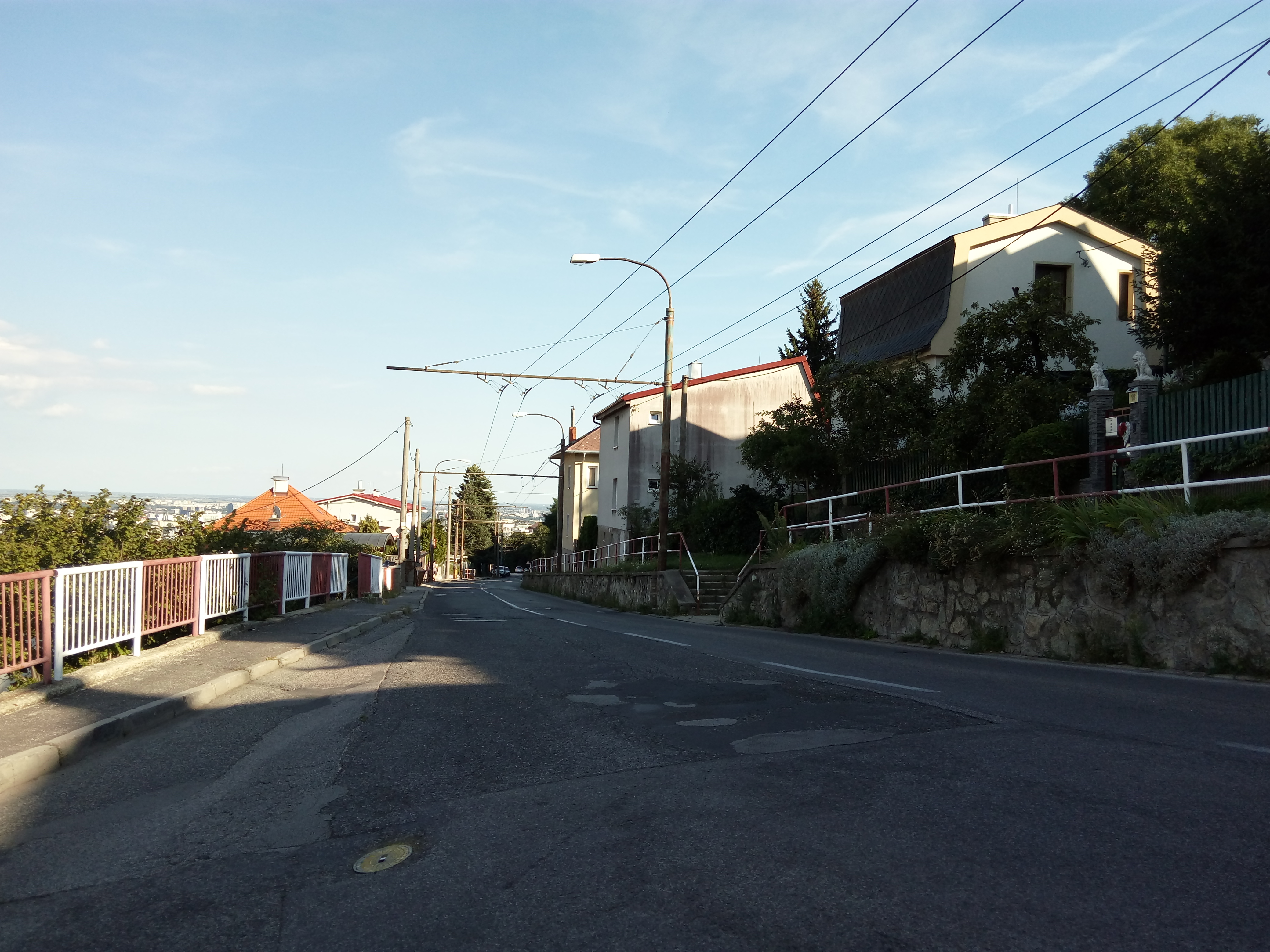 Hlavná, Nové Mesto, Bratislava